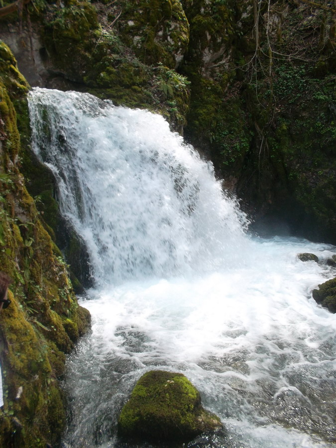 Један од извора Сане